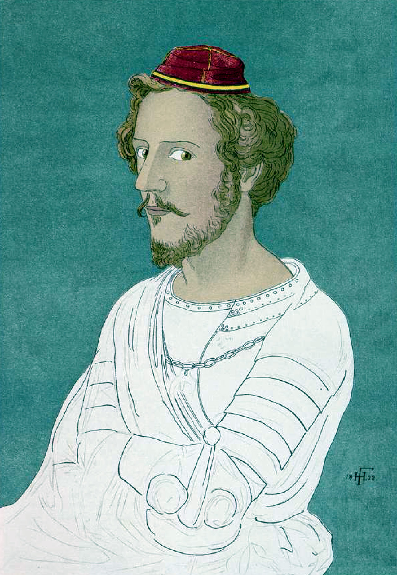 Karl August von Hase (1800-1890), deutscher evangelischer Theologe